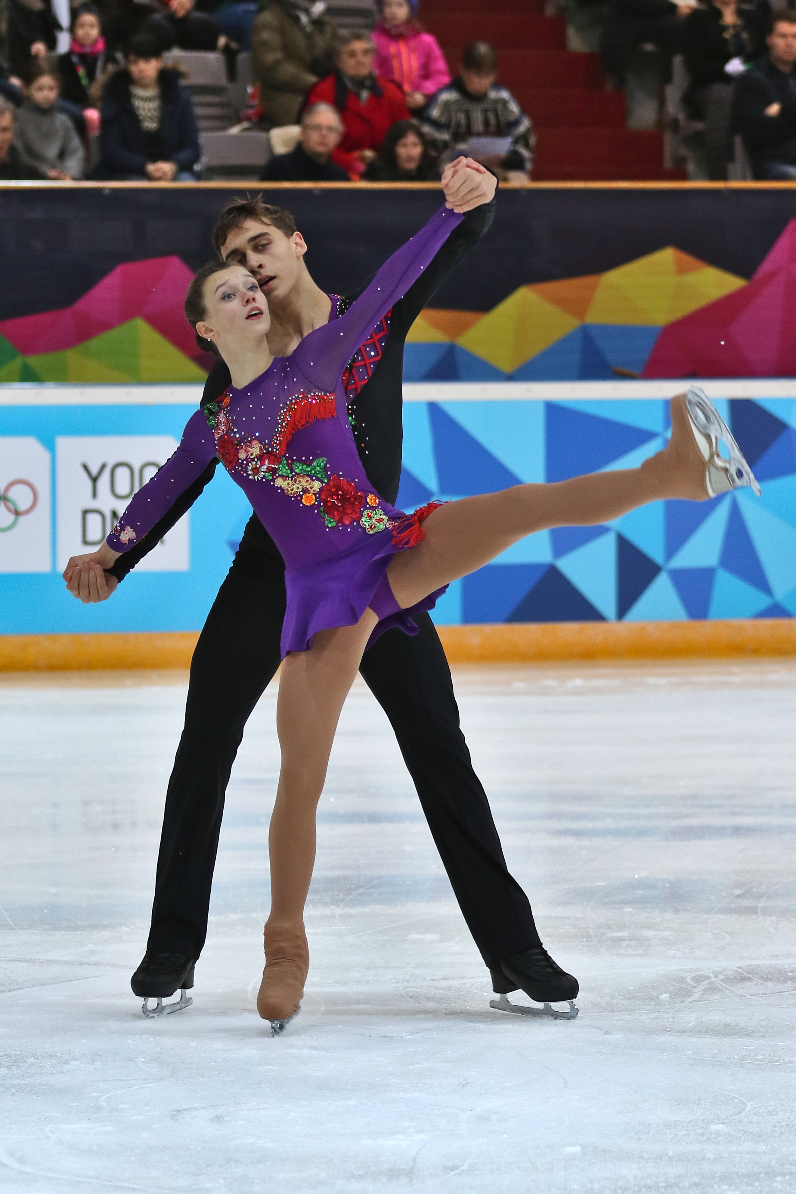 Lillehammer 2016 - Figure Skating Pairs Short Program - Anna Duskova and Martin Bidar